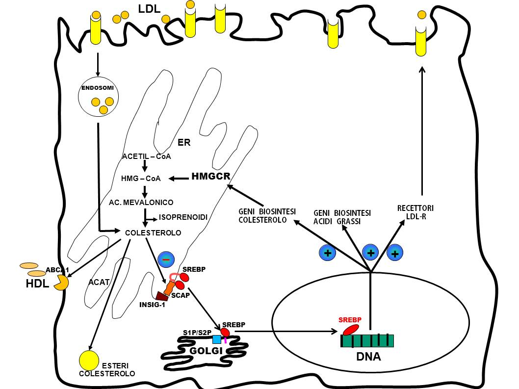 Regolazione del metabolismo intracellulare del colesterolo